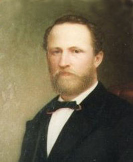 Self-portrait